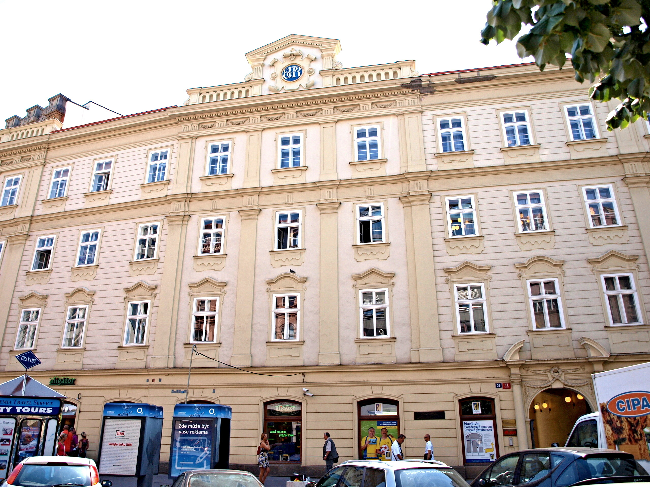 Palác Portheim-Desfours